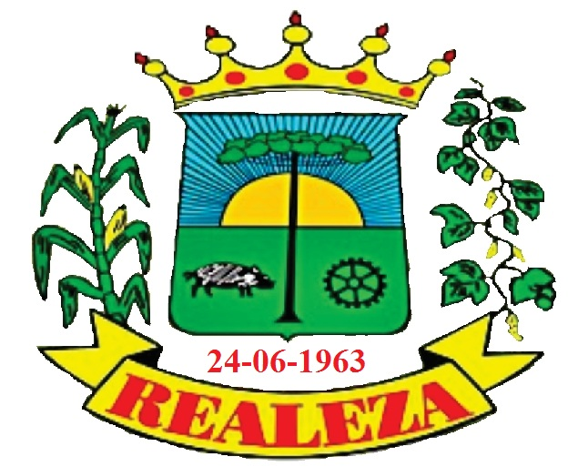 Brasão da cidade de Realeza do Estado do Paraná.